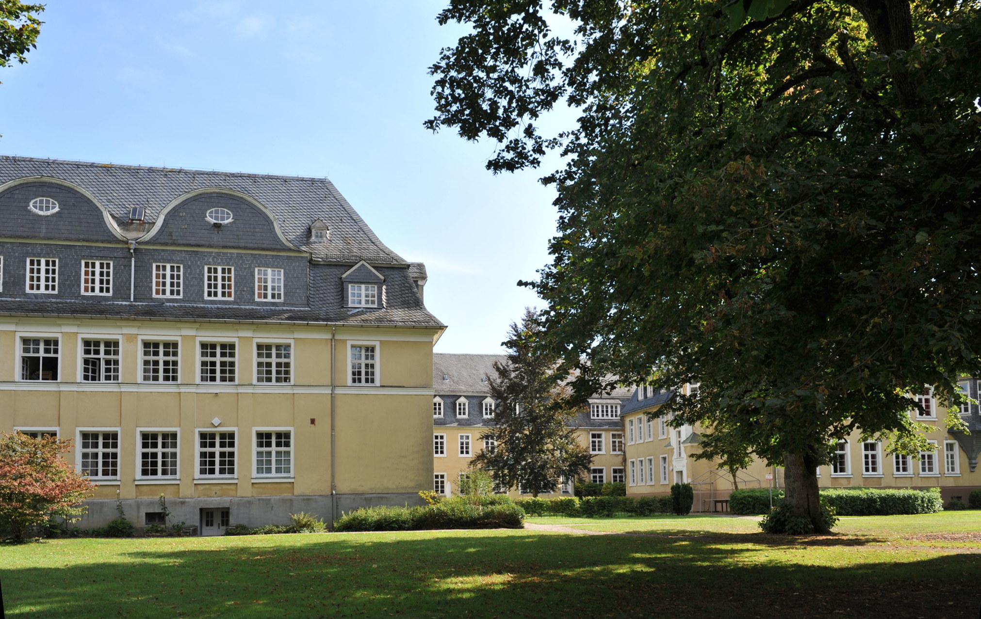 Stift Keppel bei Hilchenbach. September 2019.